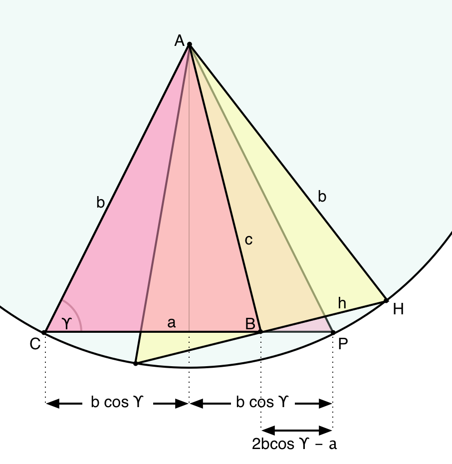 Demostració del teorema del cosinus fent servir geometria del cercle cas 2